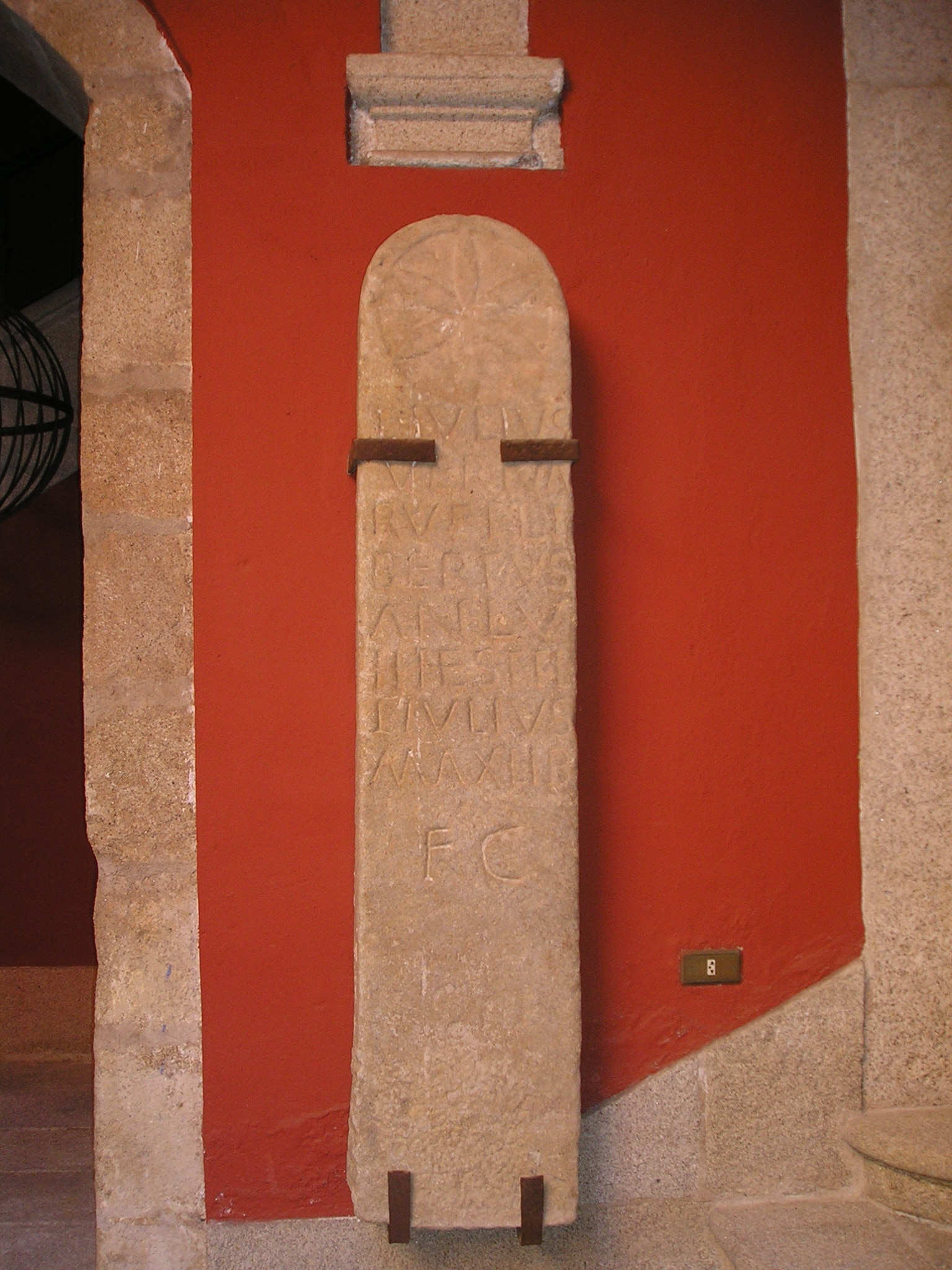 Epitafio romano correspondiente a la inscripción CIL II, 5309, procedente Torreorgaz (Cáceres, españa), depositada actualmente en El Placio del Comendador de Cáceres, actual Parador Nacional de la ciudad, cuyo texto dice: L(ucius)· IVLIVS/ VERNA/ RVFI· LI/BERTVS/ AN(norum)· LV/ HI(c)· E(st)· S(it)· T(ibi)· T(erra)· L(evis)·/ L(ucius)· IVLIVS/ MAX(imi)· LIB(erti)/ F(aciendum)· C(uravit)